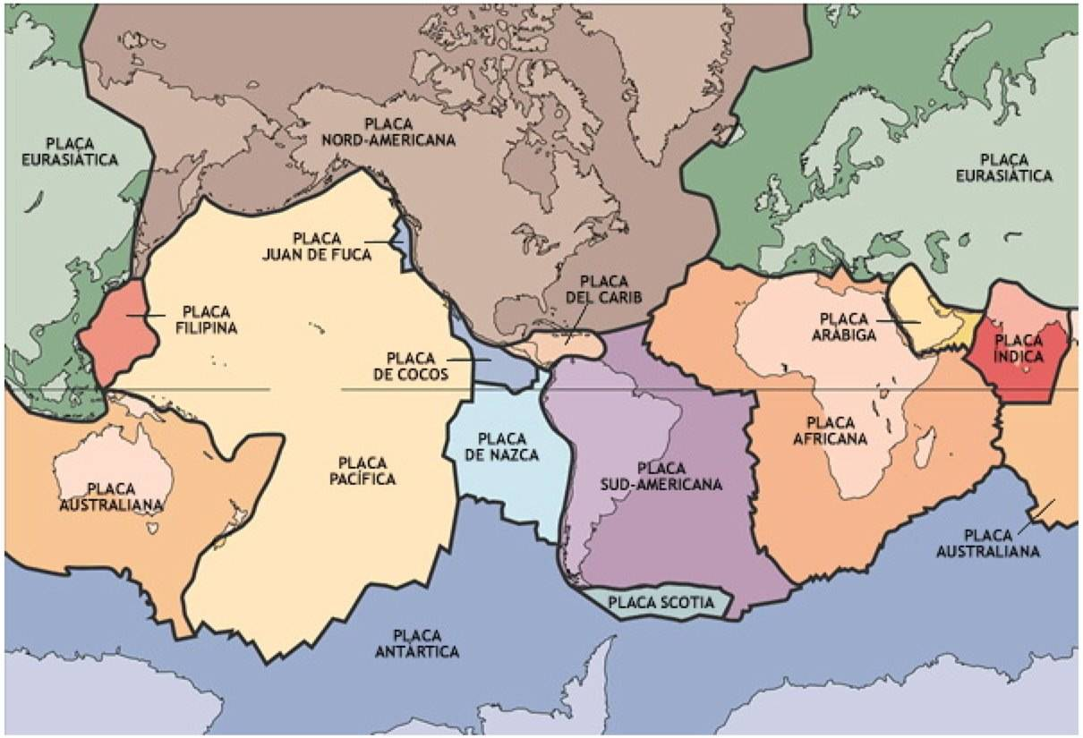 Traducció al català de la imatge Image:Tectonic plates.png